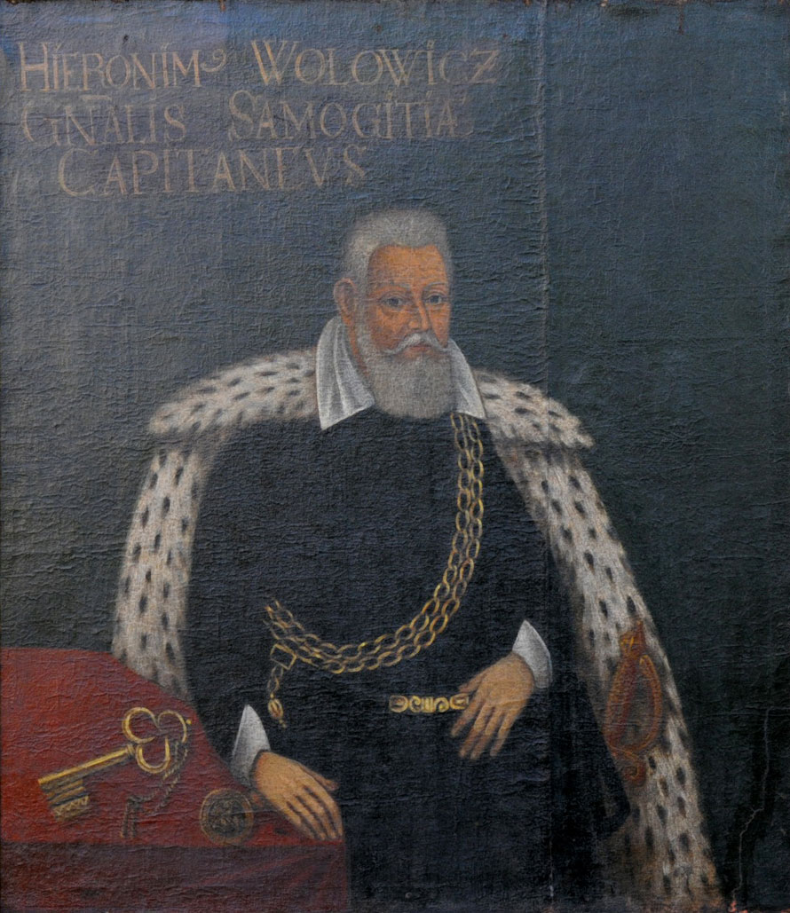 Беларуская (тарашкевіца): Партрэт Гераніма Валовіча (Hieranim Vałovič)